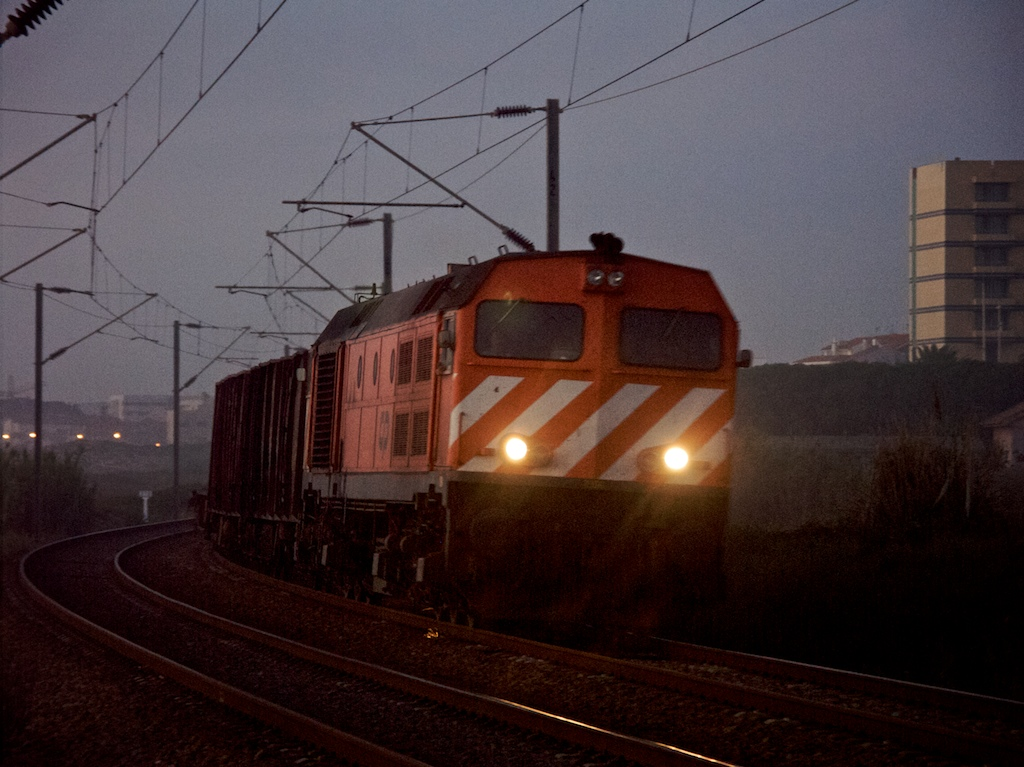 Tipo: Comboio Eixo 51036 [Vila Nova de Gaia - Entroncamento] Local: São Félix da Marinha [Linha do Norte, PK 318] Data e hora: 15 de Outubro de 2008 [19h06] Material: Locomotiva 1966 + xx vagões (CP Ealos, CP Rlps e CP Rblps)